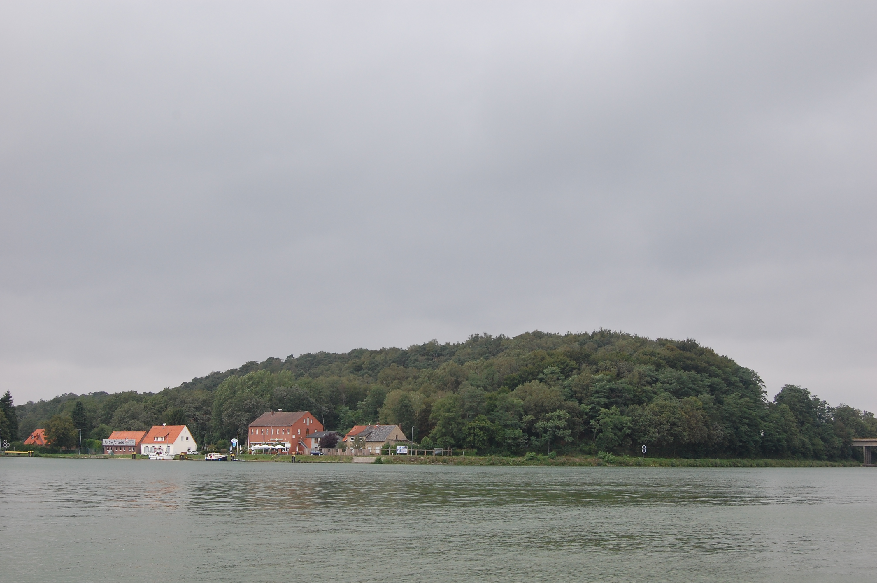 Blick auf den Huckberg (Hörstel) vom Südufer des Nassen Dreiecks aus gesehen.